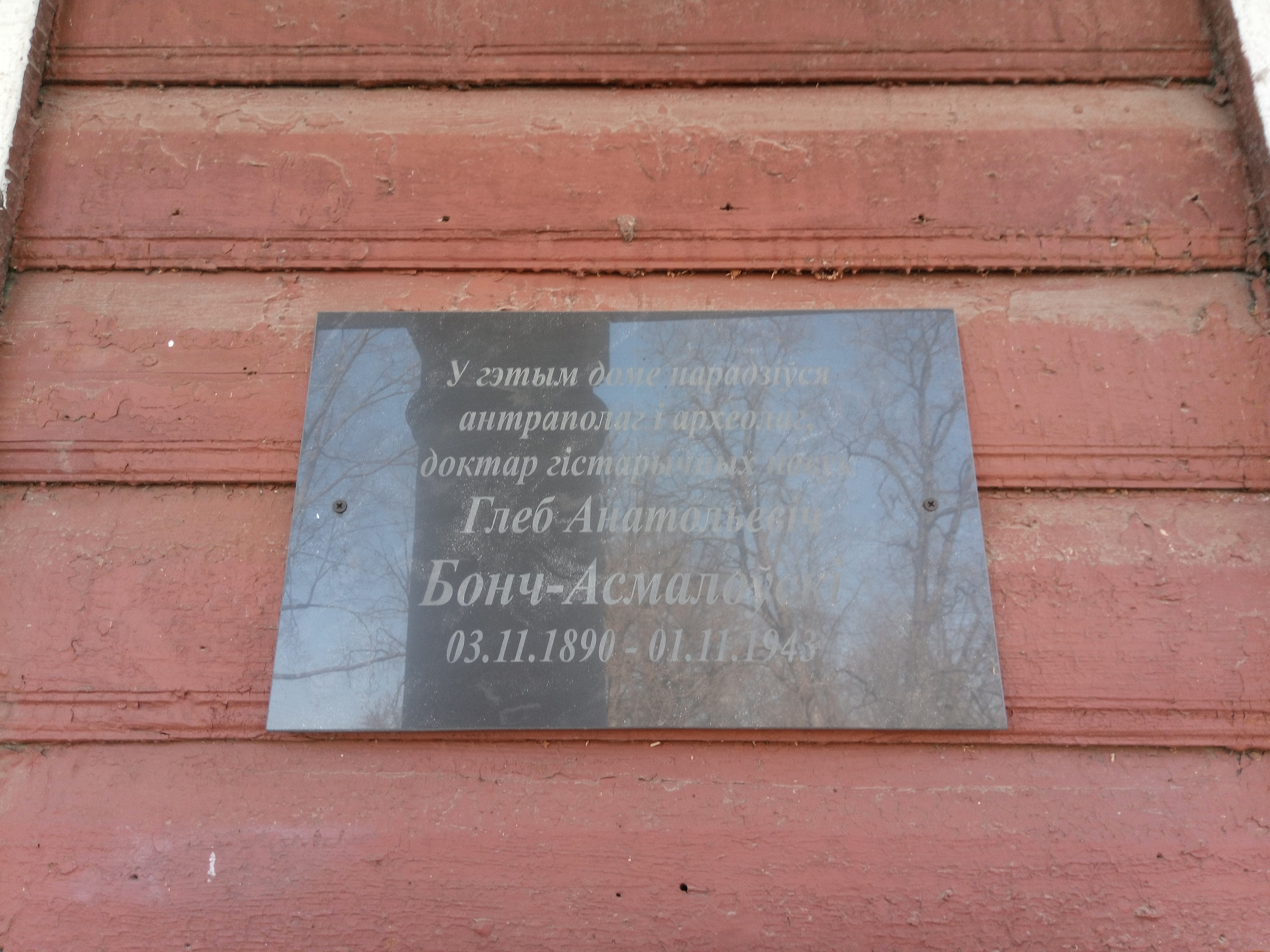 Памятная таблічка ў гонар Глеба Анатолевіча Бонч-Асмалоўскага.